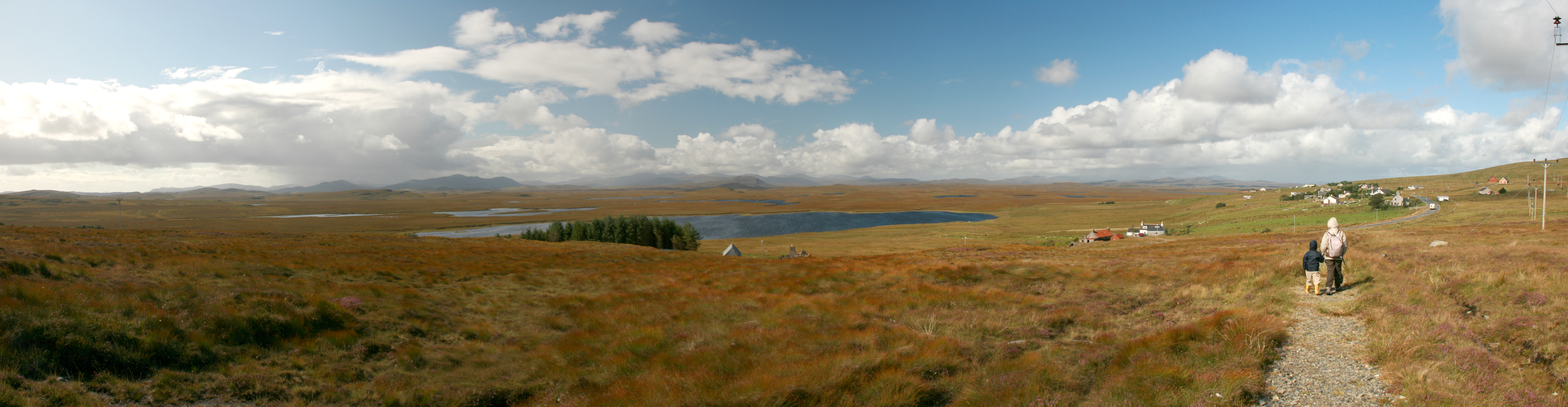 Vista de Achmore desde el círcul de piedras. Panorámica compuesta con 4 fotos.